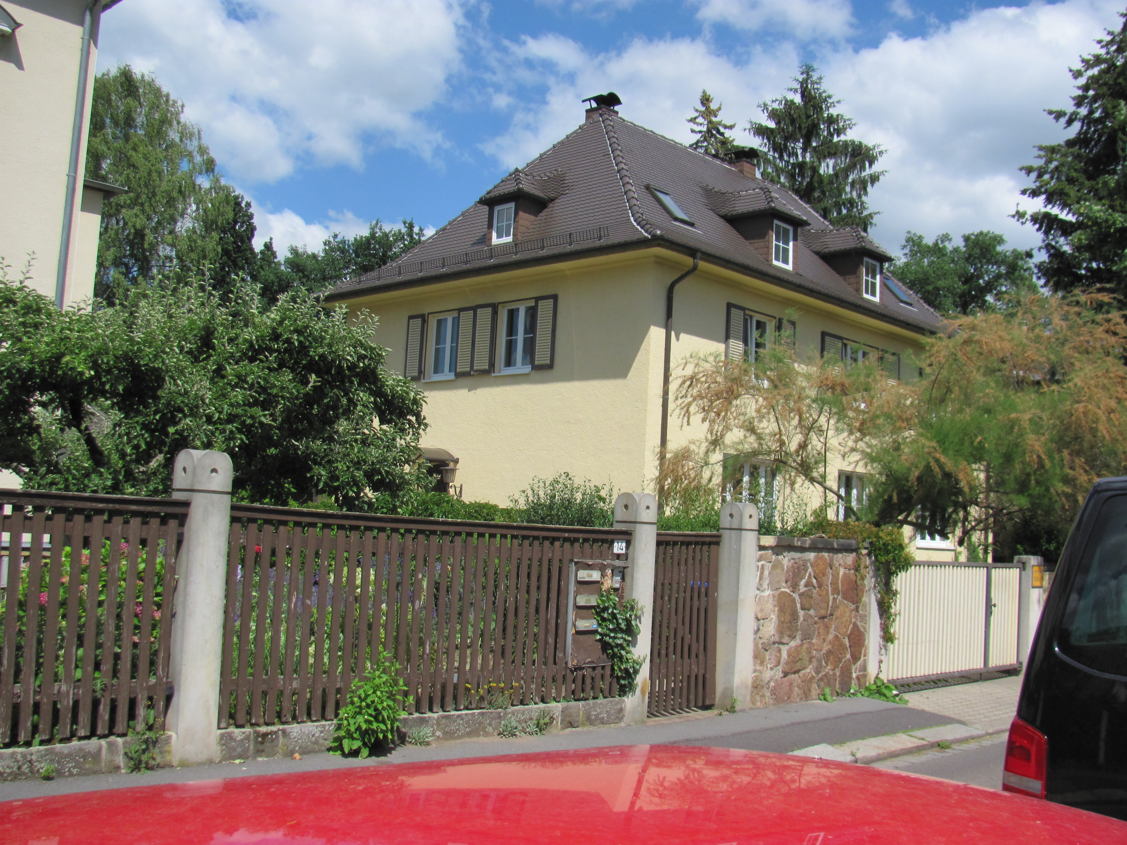 Fehlende Kulturdenkmale nach Wikipedialiste in Heinrich-Heine-Straße, Horst-Vieth-Straße, Humboldtstraße, Dr-Rudolf-Friedrichstraße